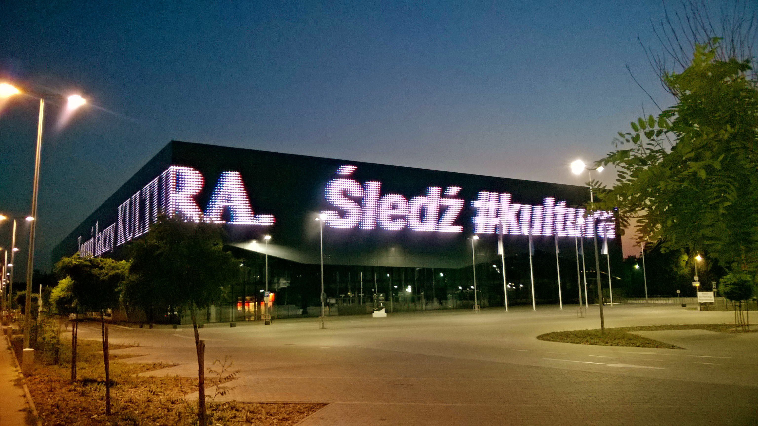 Hala sportowo-widowiskowa w Toruniu77